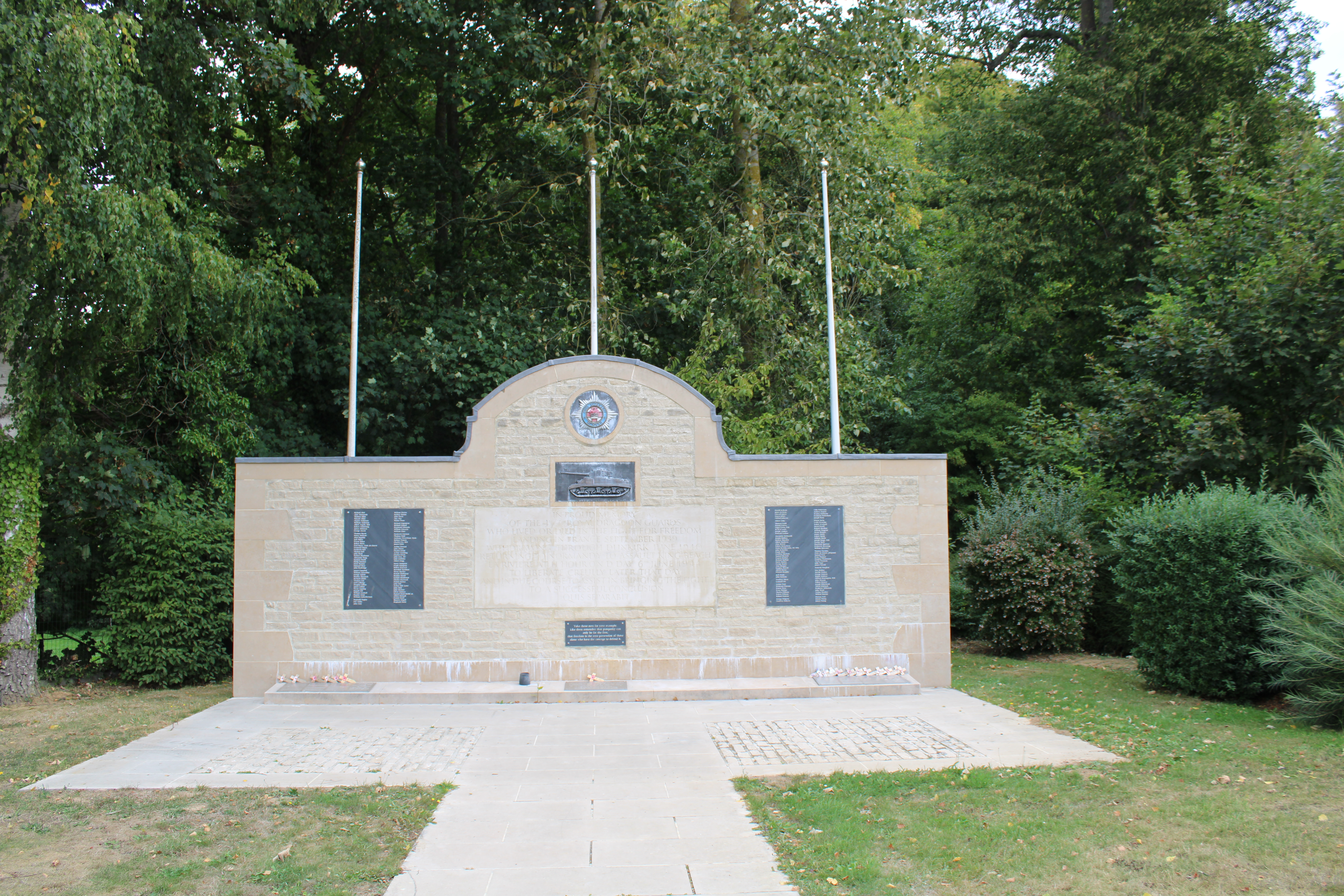 Monument du Royal Dragoon Guards